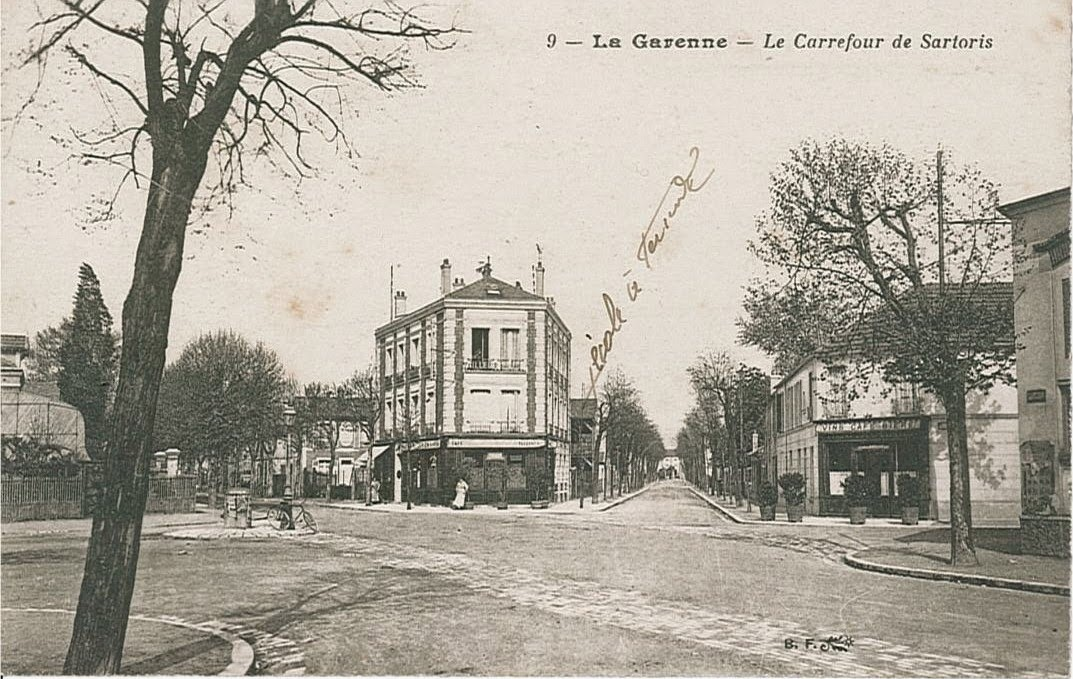 La Garenne-Colombes: Rond-point Valpacos, rue de l'Aigle et rue Sartoris